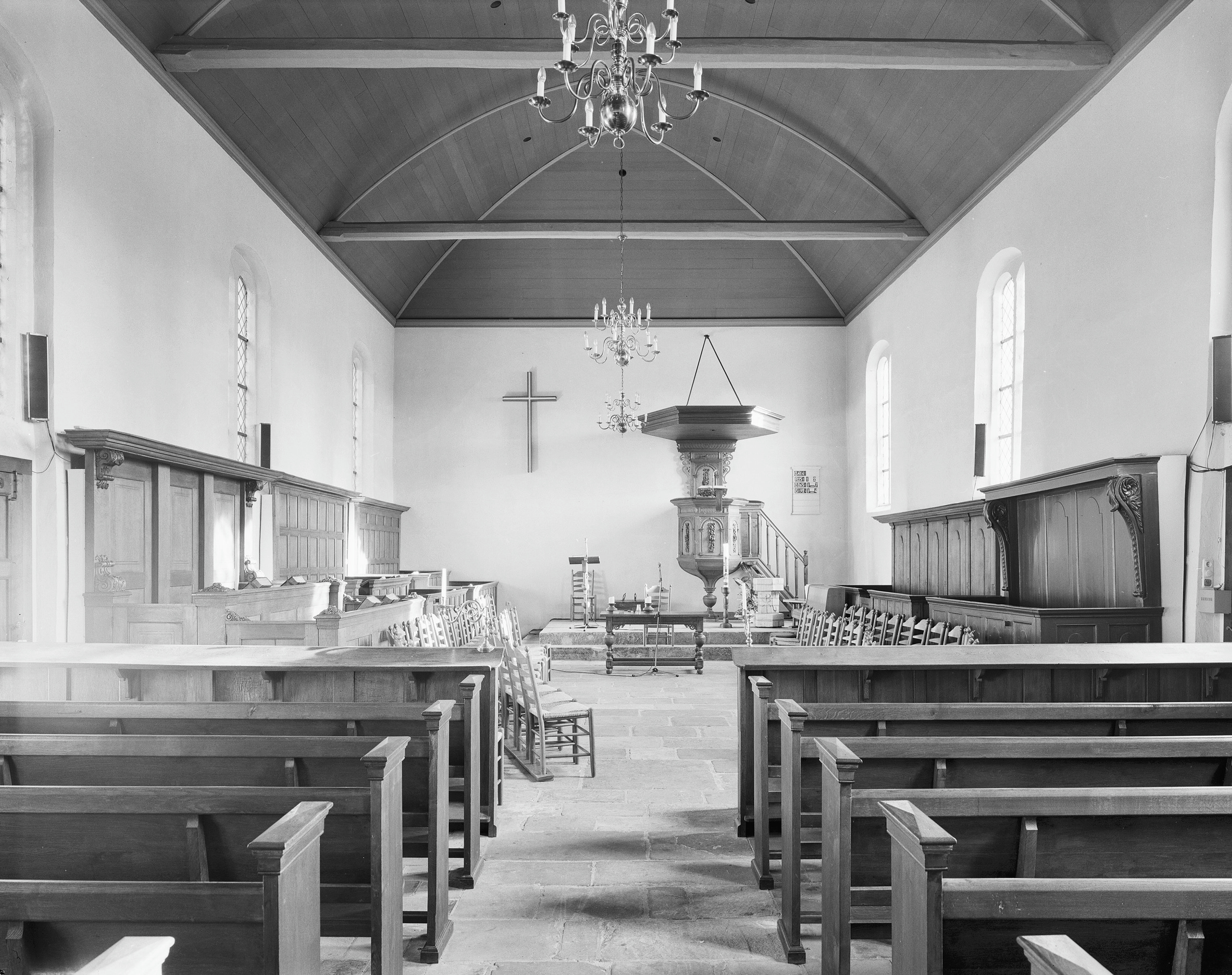 Nederlands Hervormde Kerk: Interieur, overzicht naar het oosten met altaar (opmerking: Gefotografeerd voor Monumenten In Nederland Overijssel)